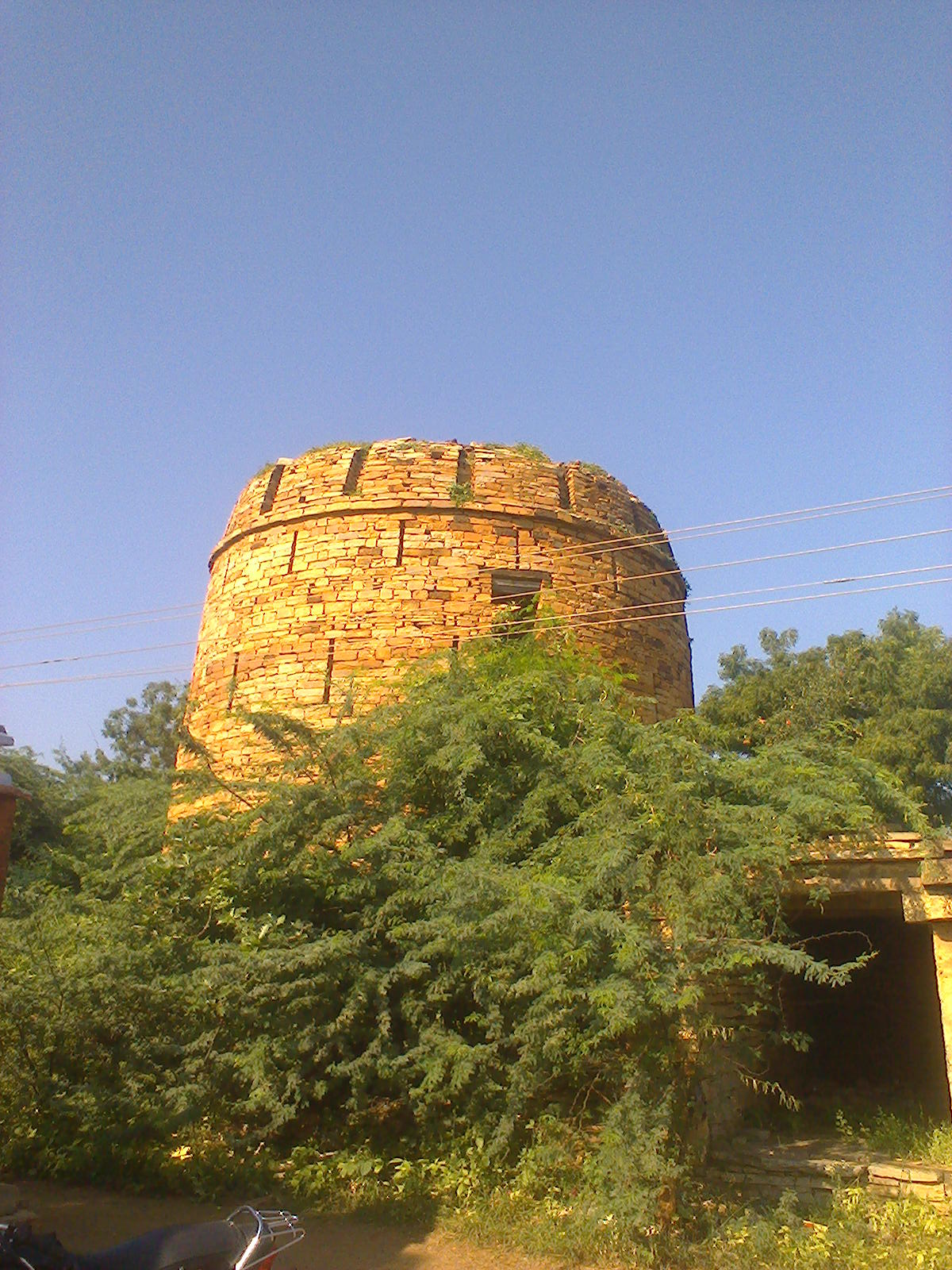 కోనేటి బురుజు